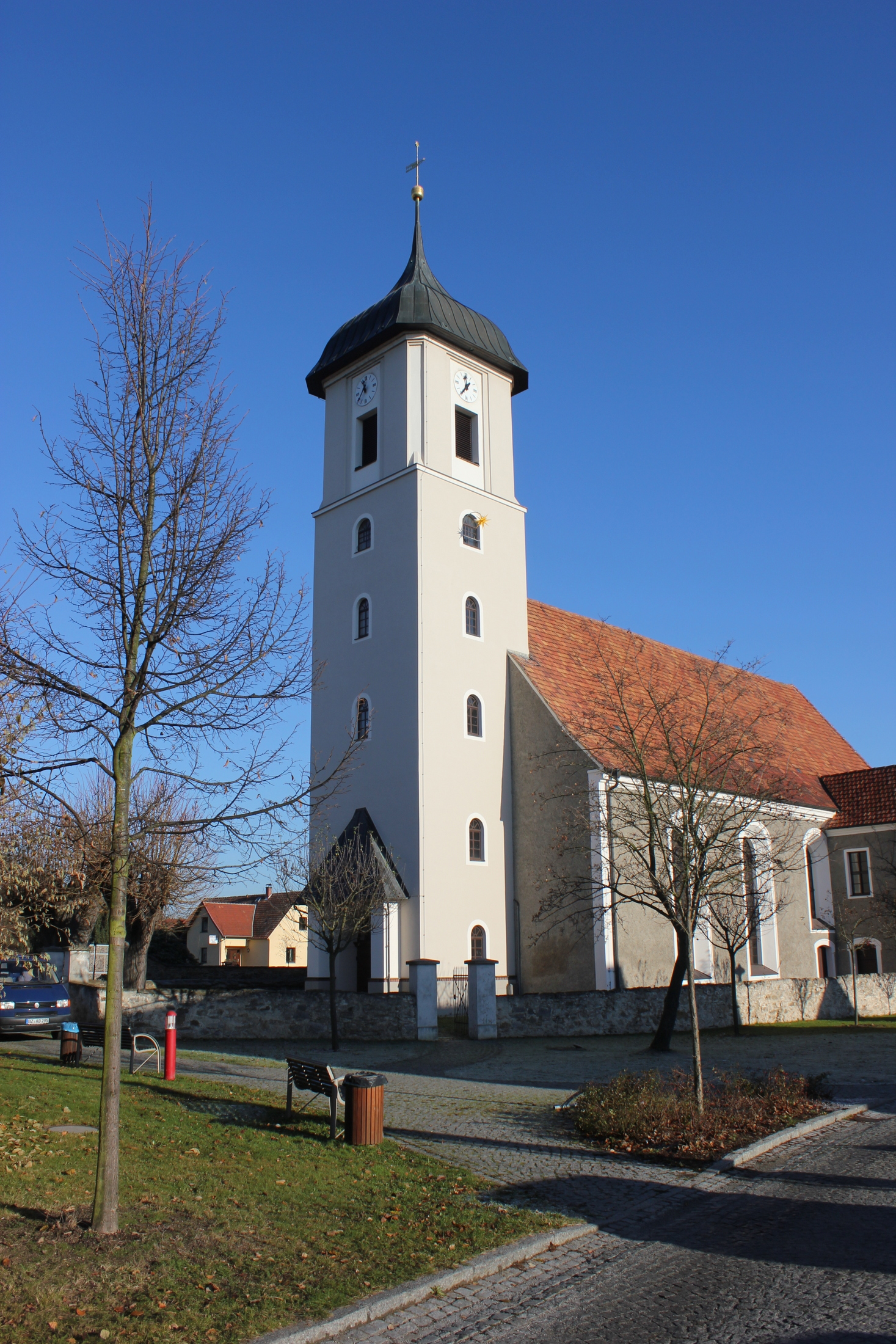 Hornjoserbsce: Ewangelska cyrkej w Malešecach.